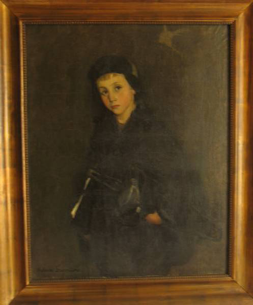 Portrait of Adli